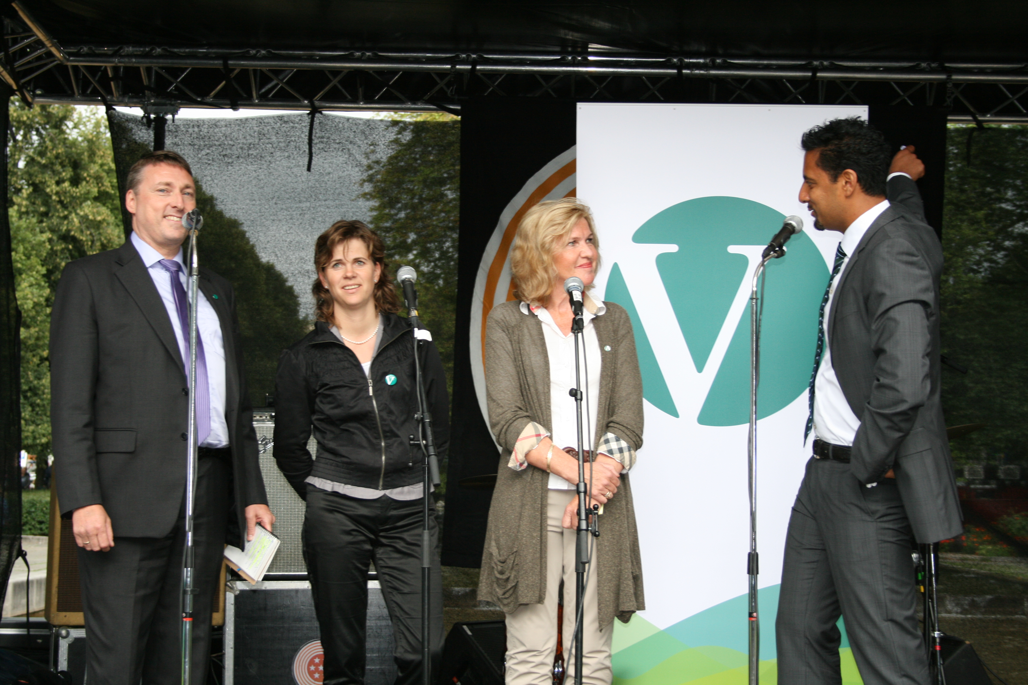 Inge Solli, Solveig Schytz, Borghild Tenden og Abid Q. Raja på Venstres nasjonale valgkampåpning i Spikersuppa i Oslo i forbindelse med lokalvalget 2011.